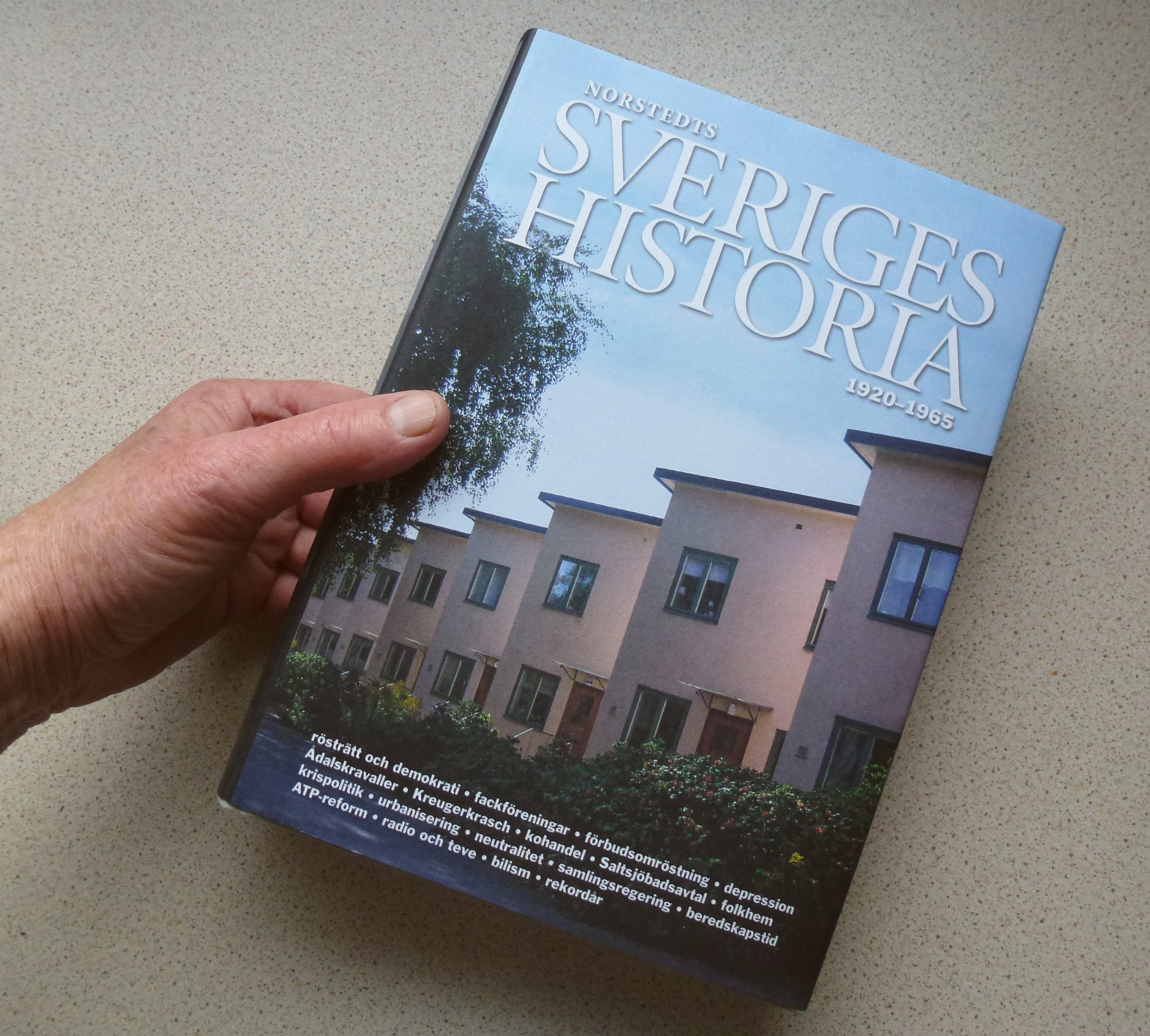 Sveriges historia (Norstedts), band 7. Omslagsfoto visande Ålstens radhus av Holger Ellgaard